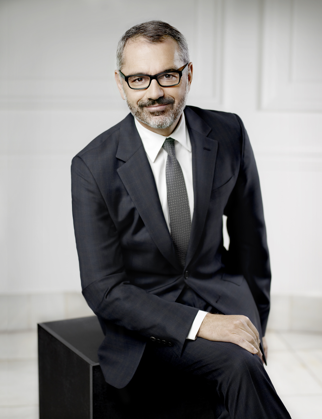 Marc Puig Guasch (Barcelona, 1962), director general de Puig